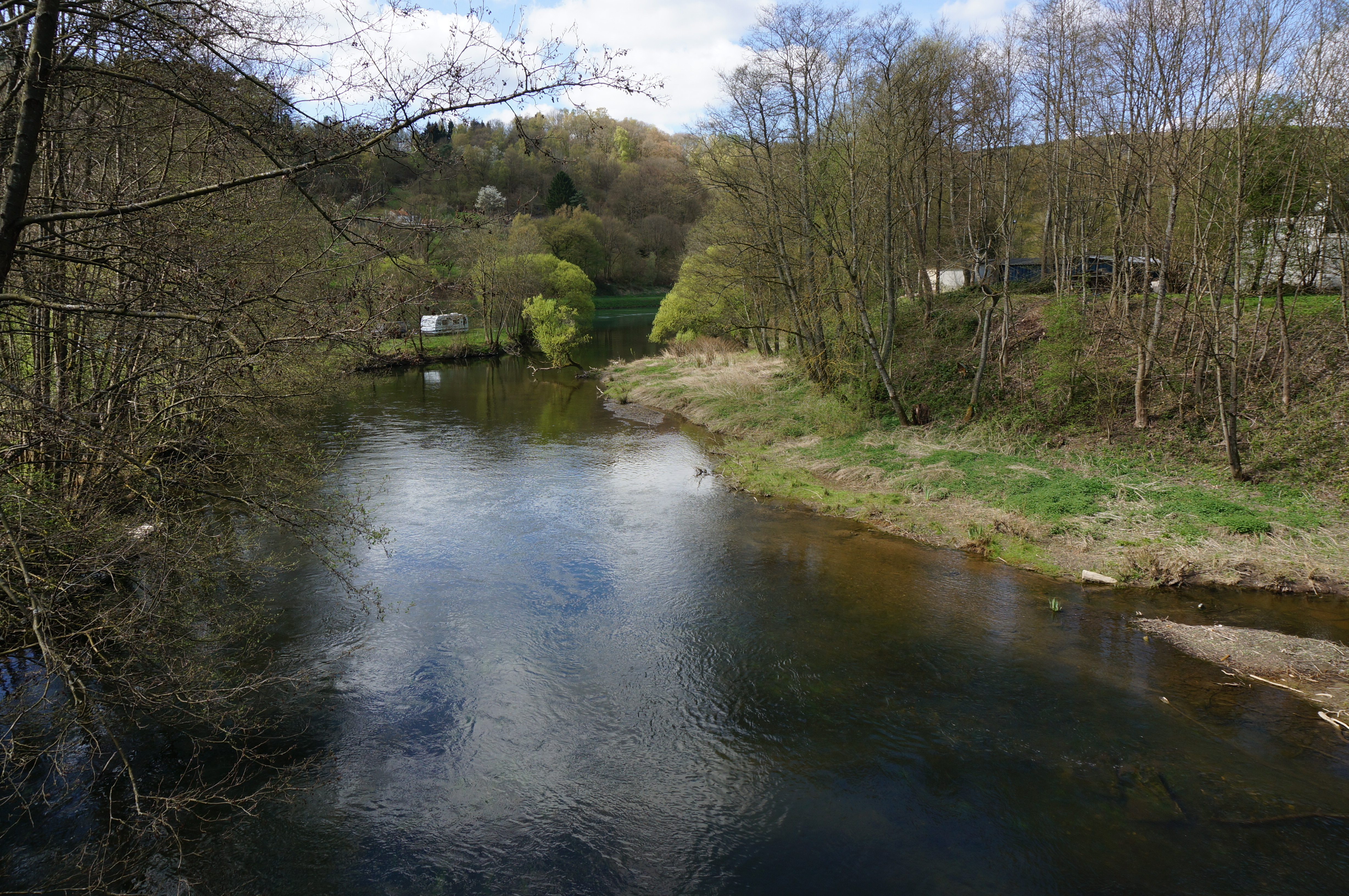 à Monthermé.